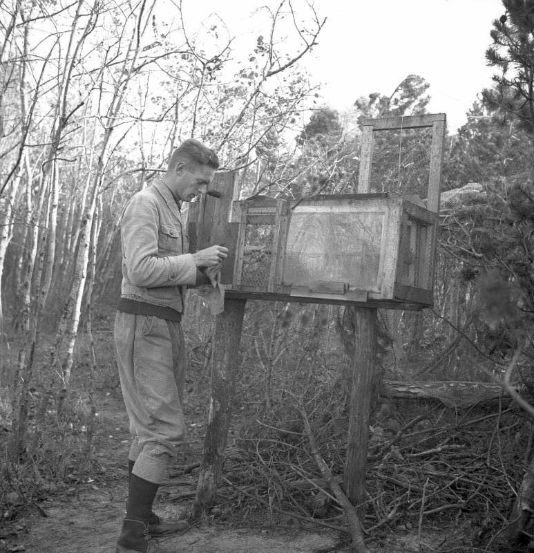 Rossitten, Vogelwarte, Fangen und Beringen